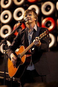 Foto Neil Finn